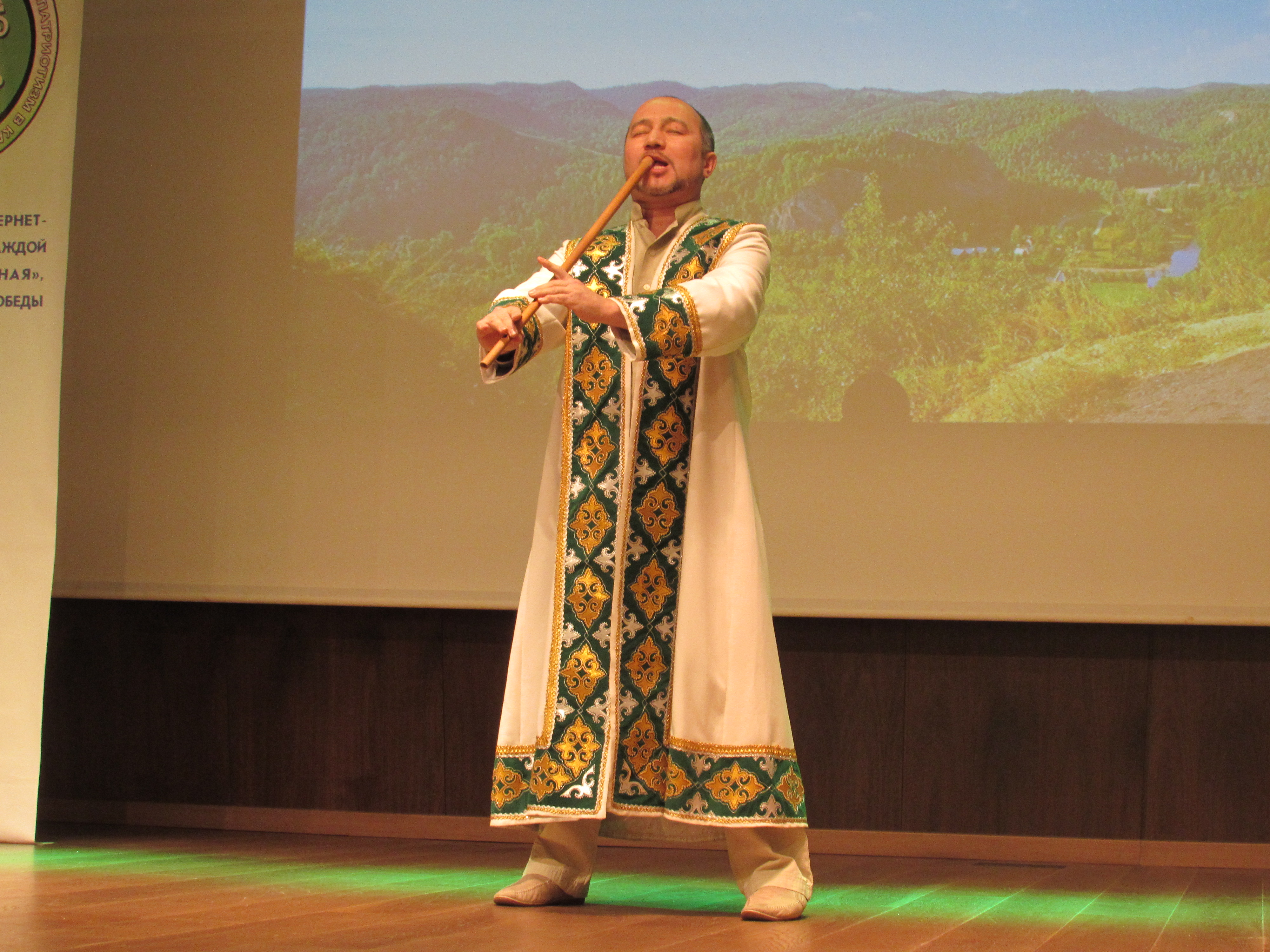 Моя родословная